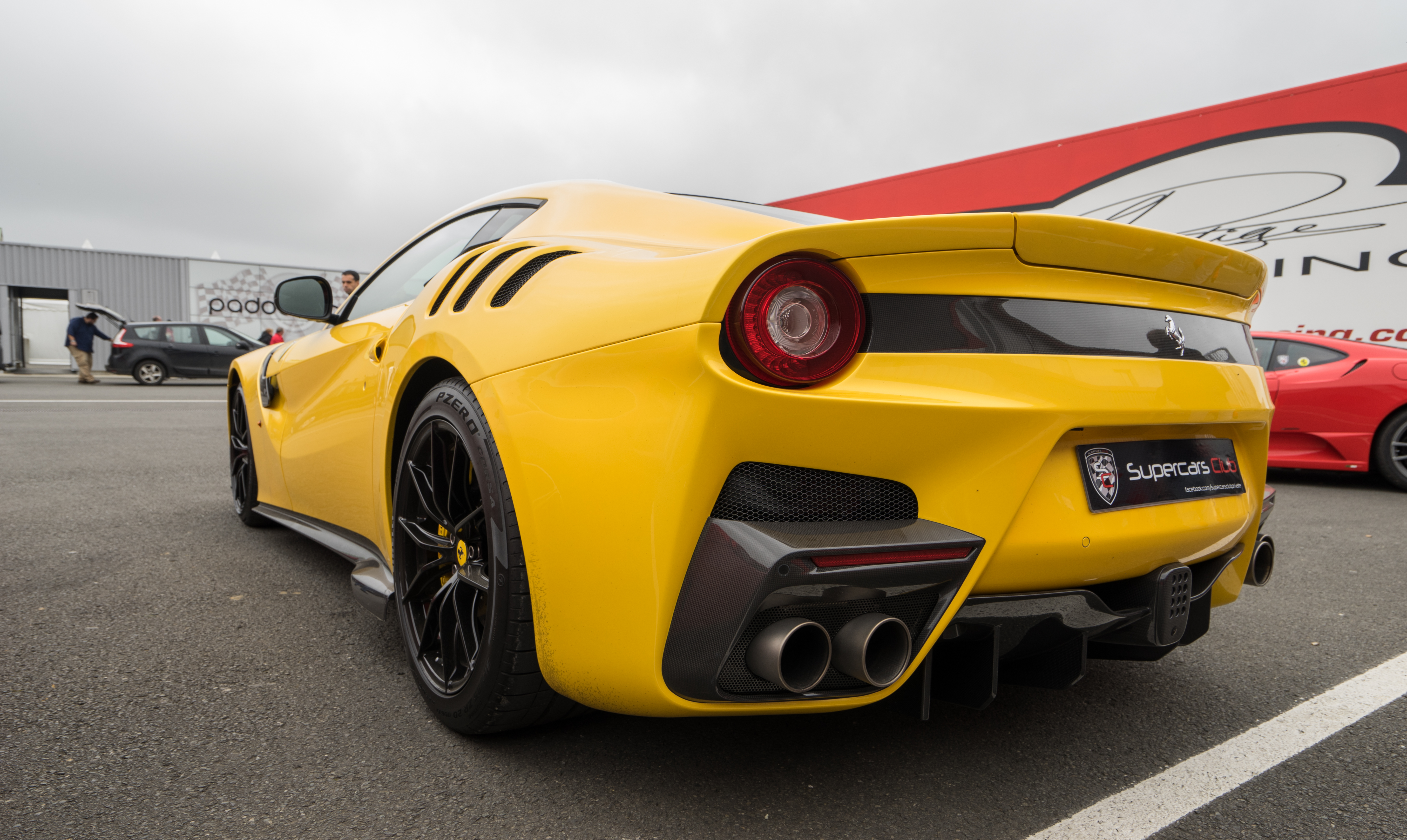 Ferrari F12 Tour de France